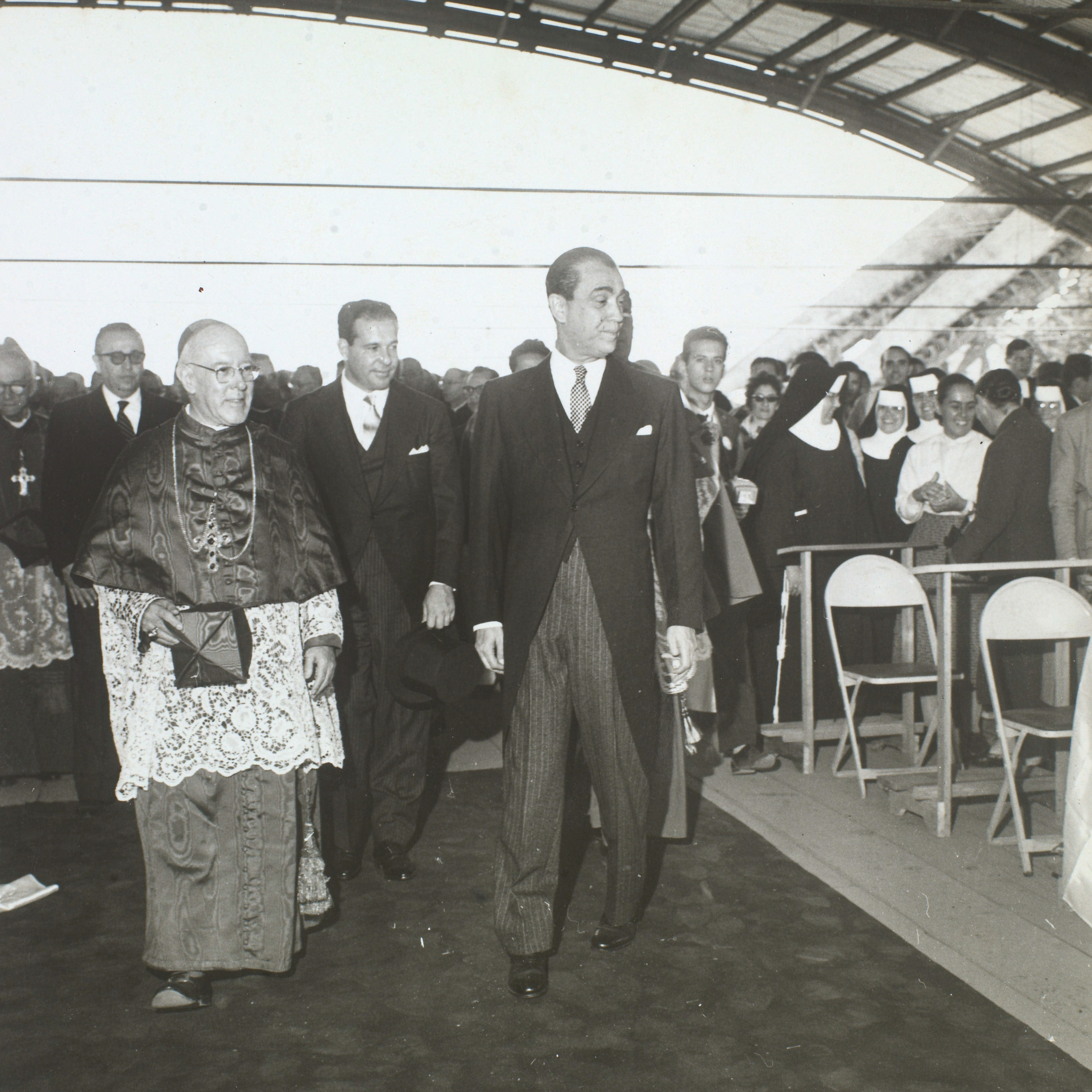 Fotografia do Fundo Correio da Manhã, sob a guarda do Arquivo Nacional.